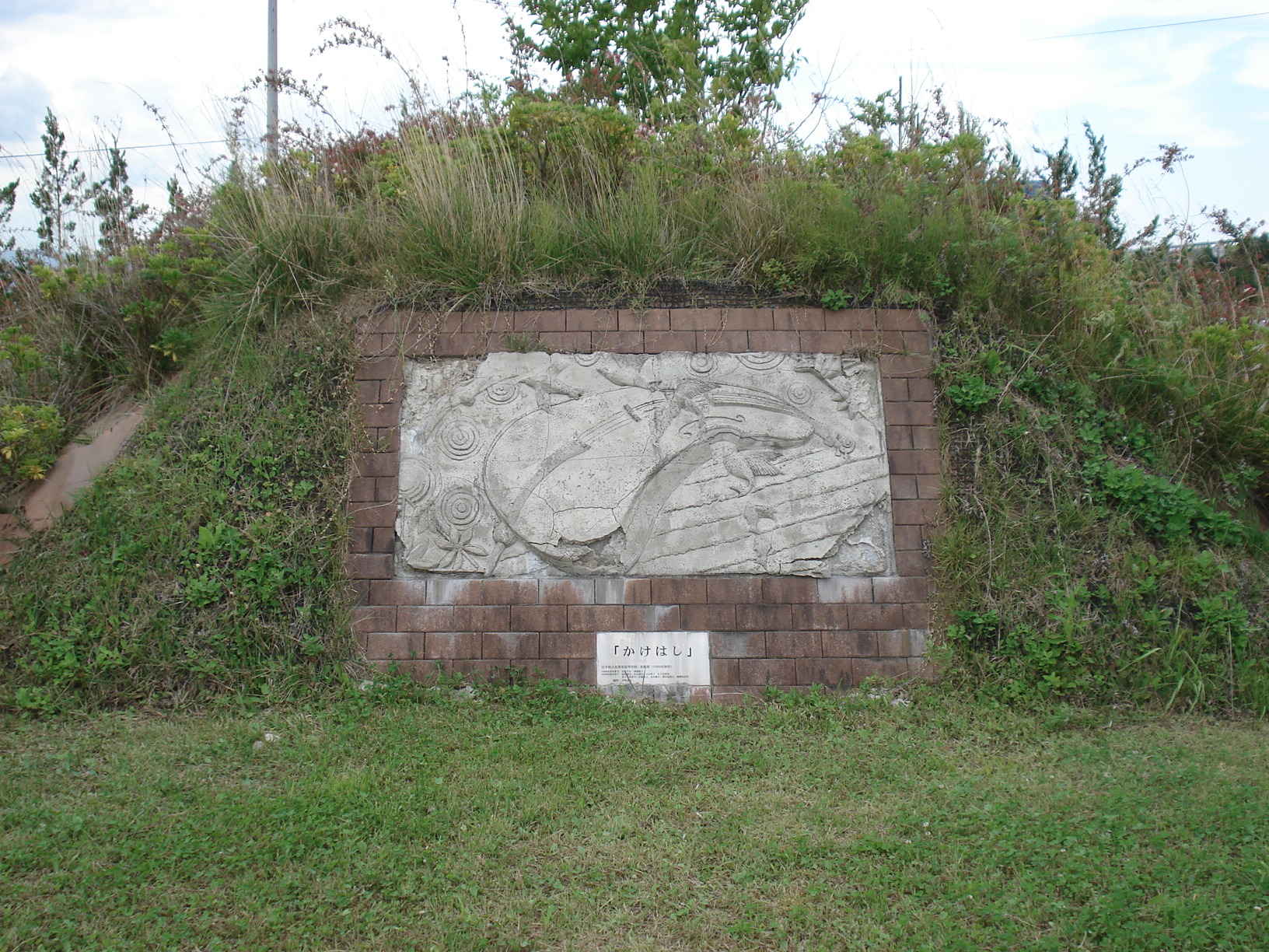 釜石自動車道花巻空港インターチェンジ敷地内にあるレリーフ「かけはし」全景